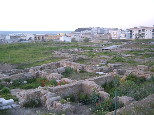 Scavi di San Pietro. 2007